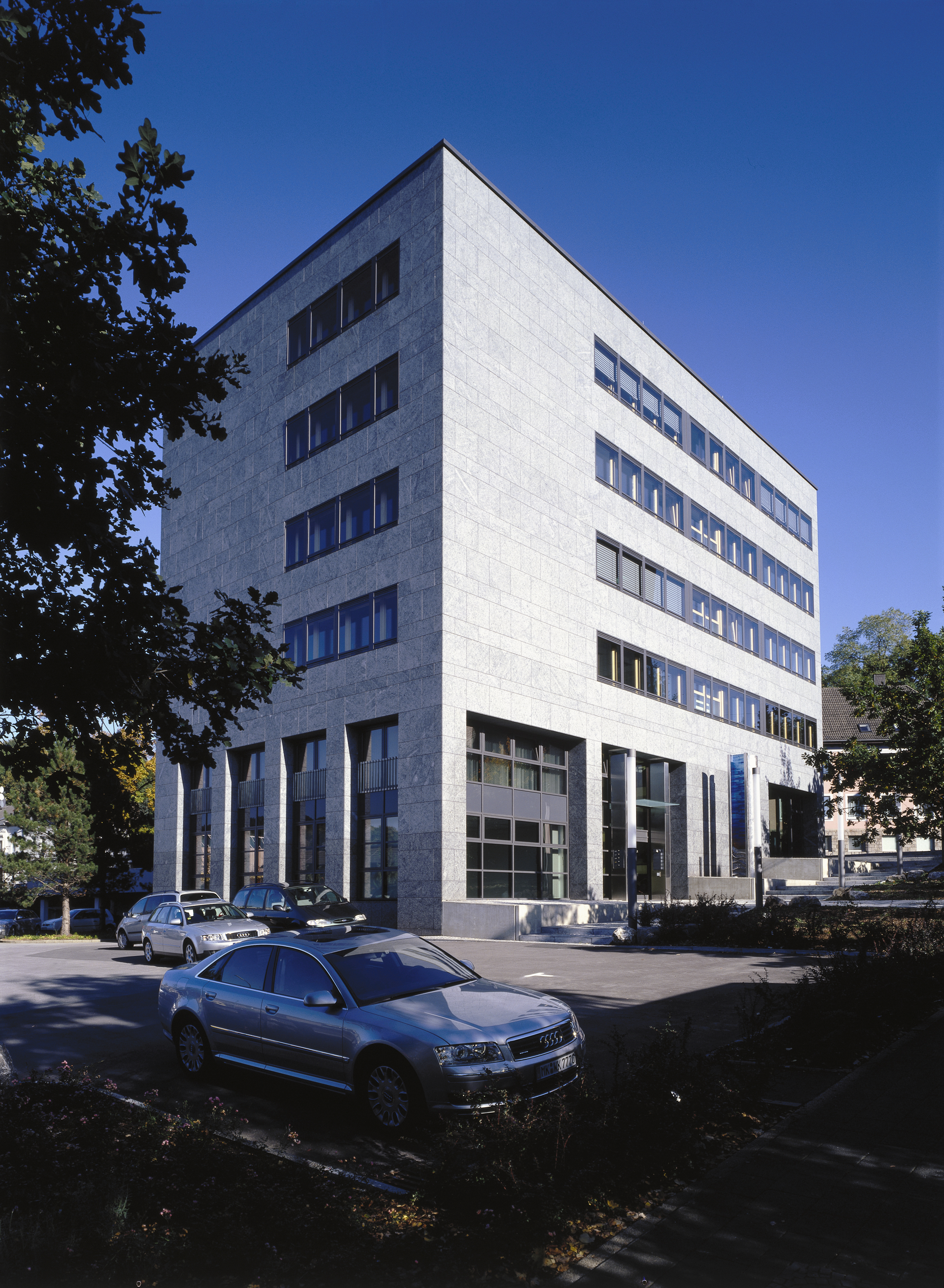 Iserlohn Stefanstraße 2